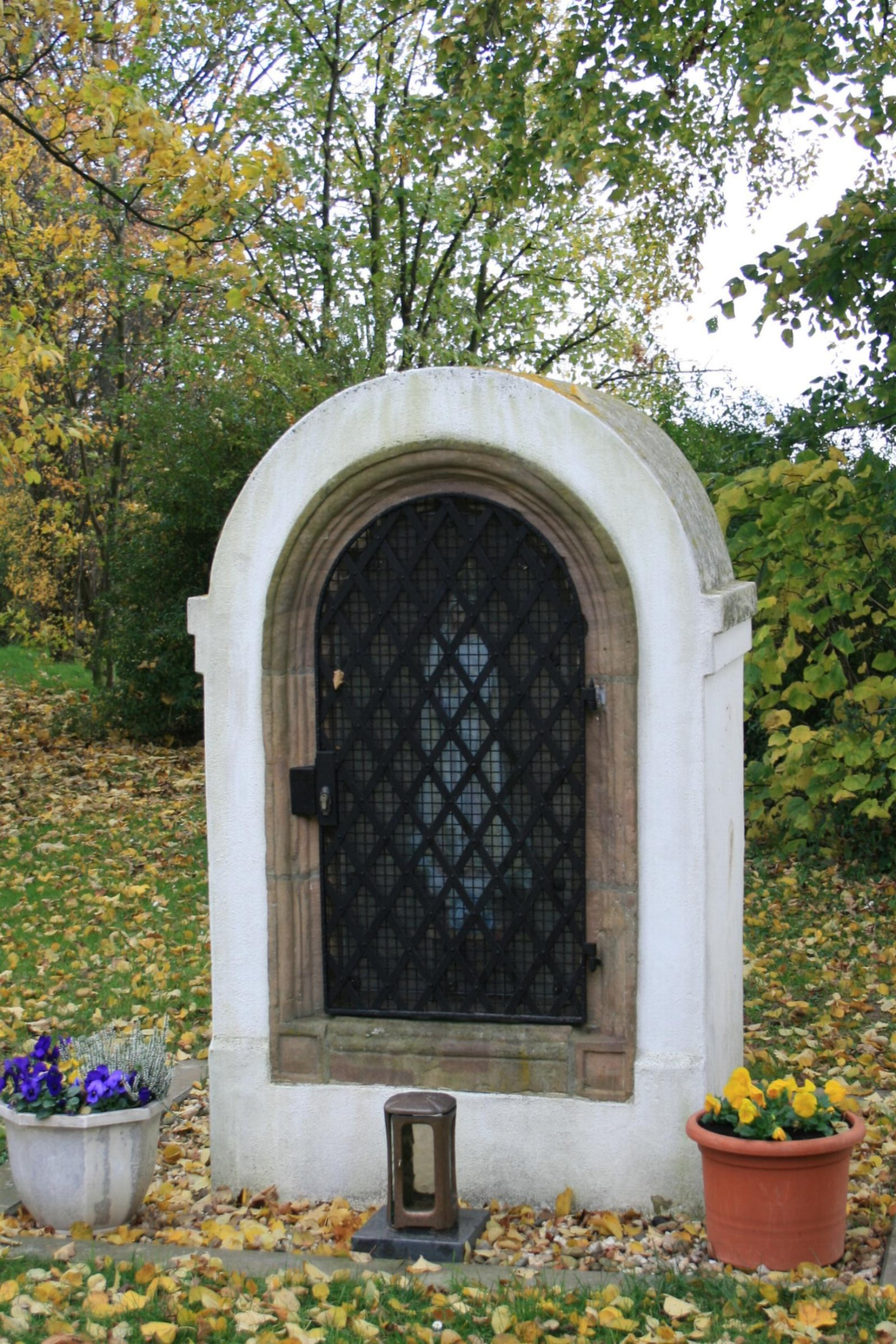 Das Heiligenhäuschen am Ortsausgang Richtung Herrig in der Kompstr. in Nörvenich-Pingsheim